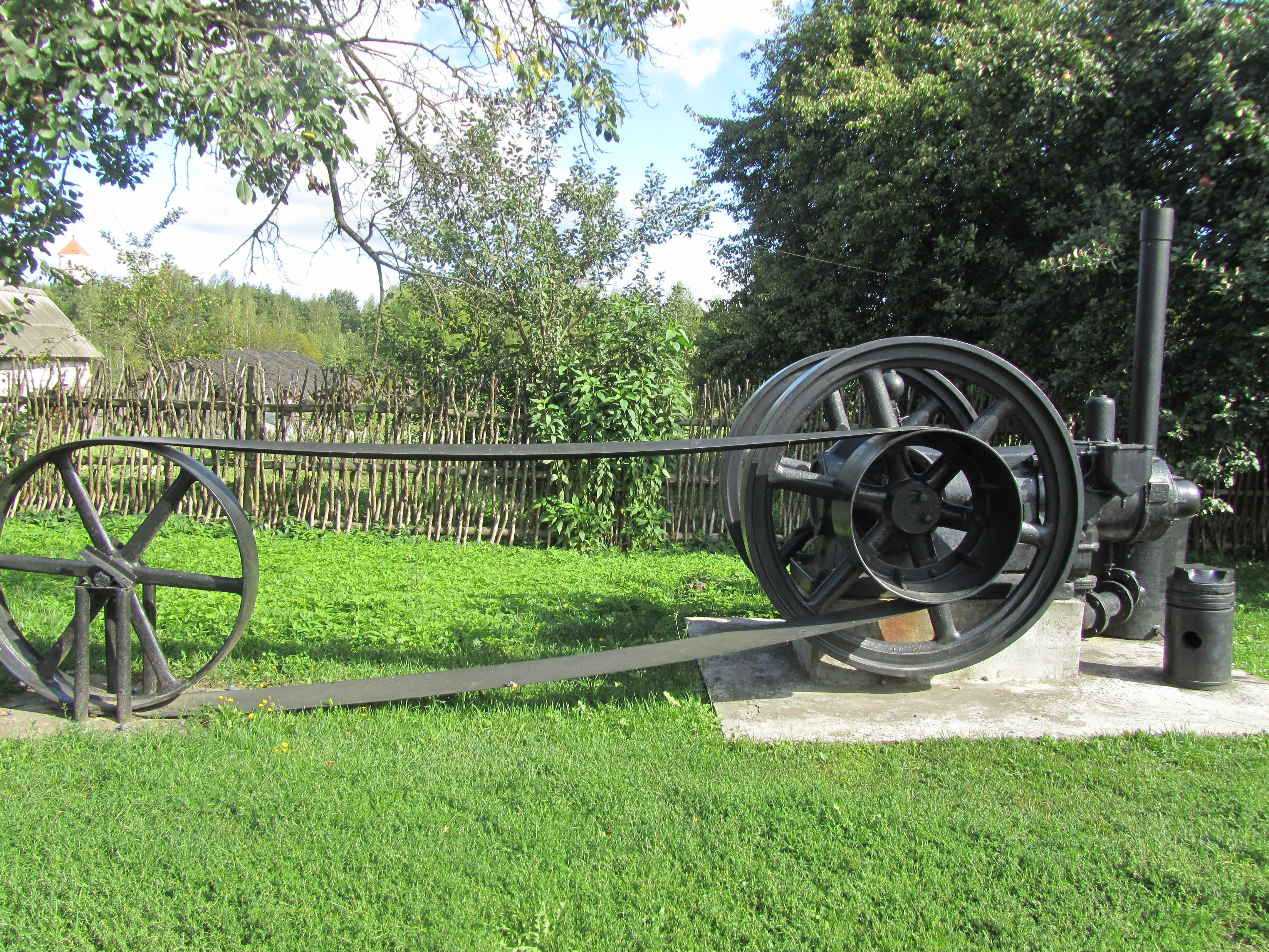 Беларуская (тарашкевіца): Музэефікаваныя аб’екты этнаграфічных комплексаў «Млын» і «Кузня»:паравы млын дом завознікаў сьвіранкузня. г. Заслаўе This is a photo of Belarusian heritage monument. Reference number: 612Г000334 ( WLM)